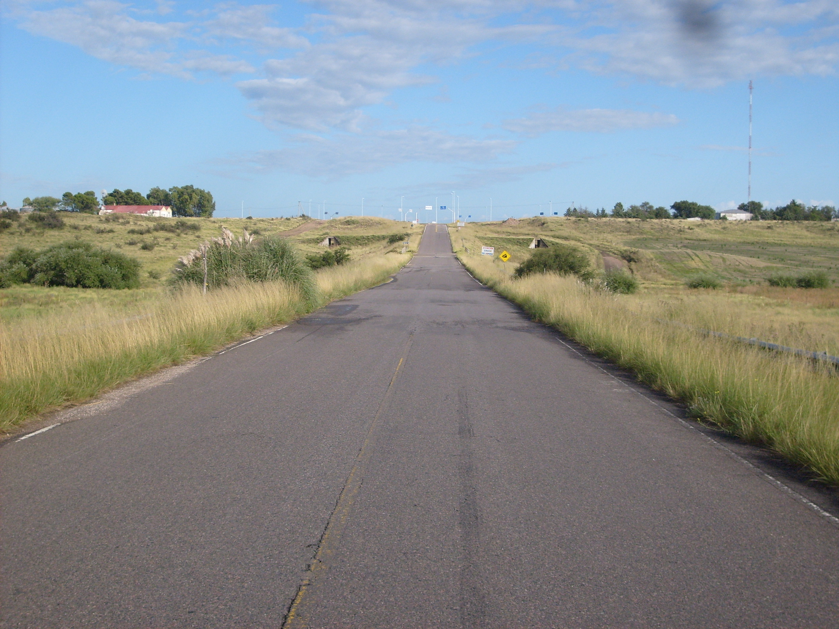 Panorámica del Parage Frapal - Ruta provincial 72 - Buenos Aires - Arg